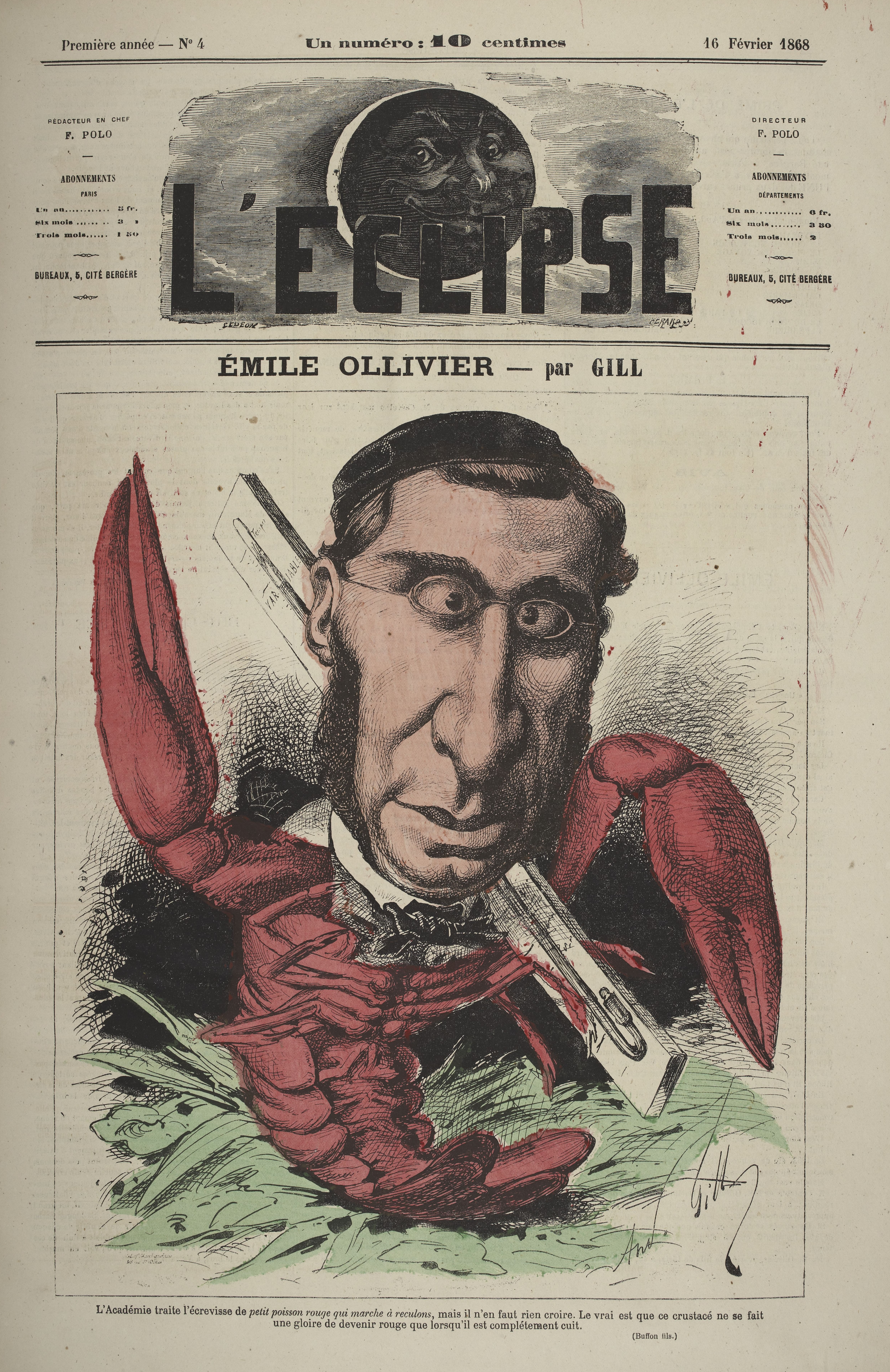 Émile Ollivier par André Gill pour le journal hebdomadaire L'Éclipse en 1868